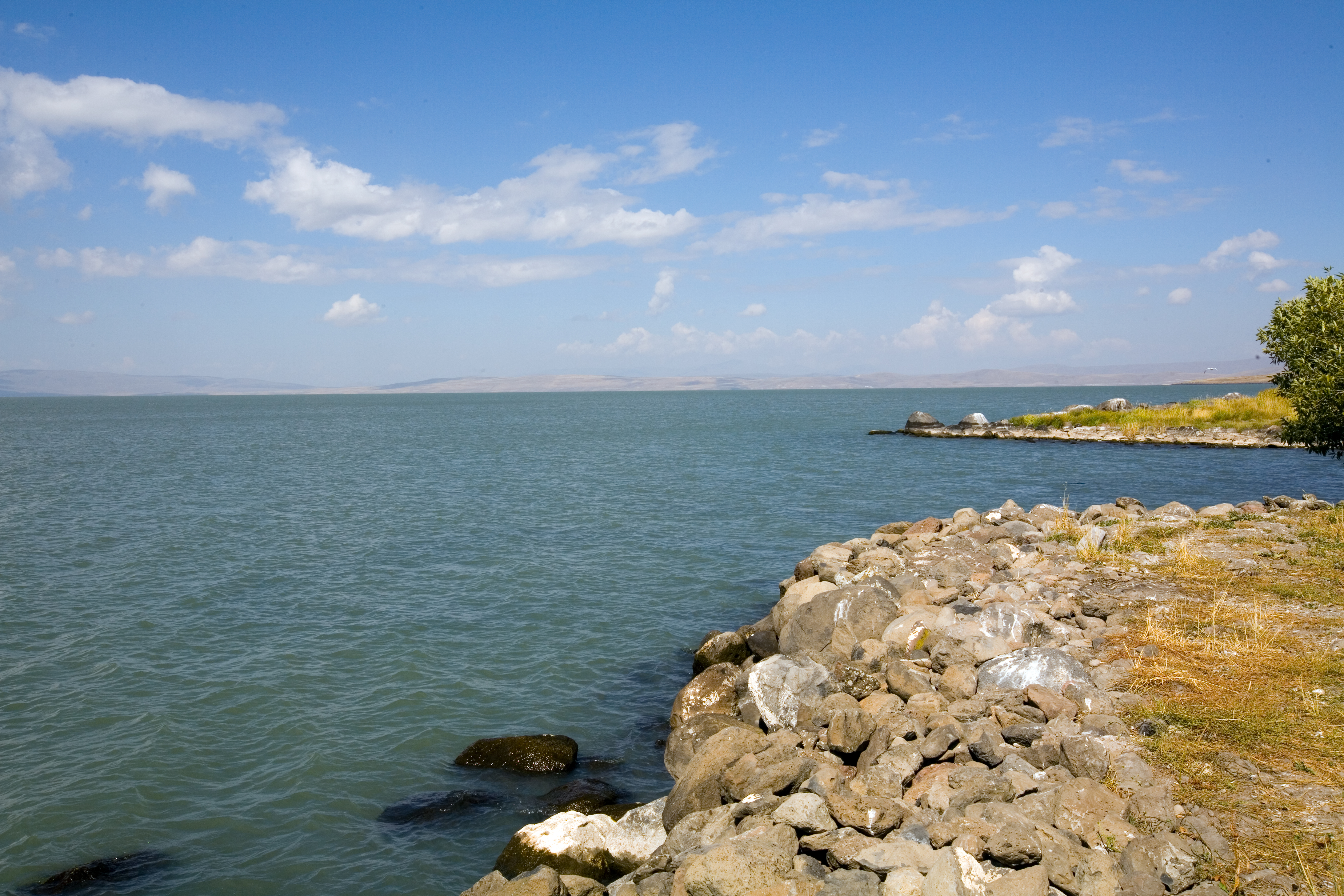 Lake Çıldır in Turkey.